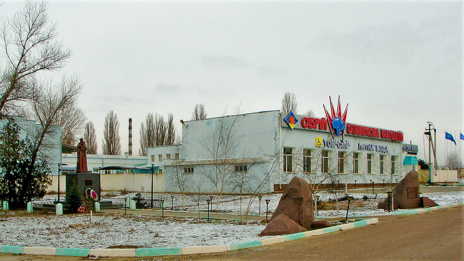 Завод Аква Сити